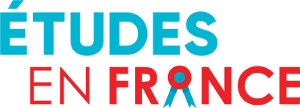 Logo du site Web "Études en France" du Ministère français de l'enseignement supérieur et de la recherche